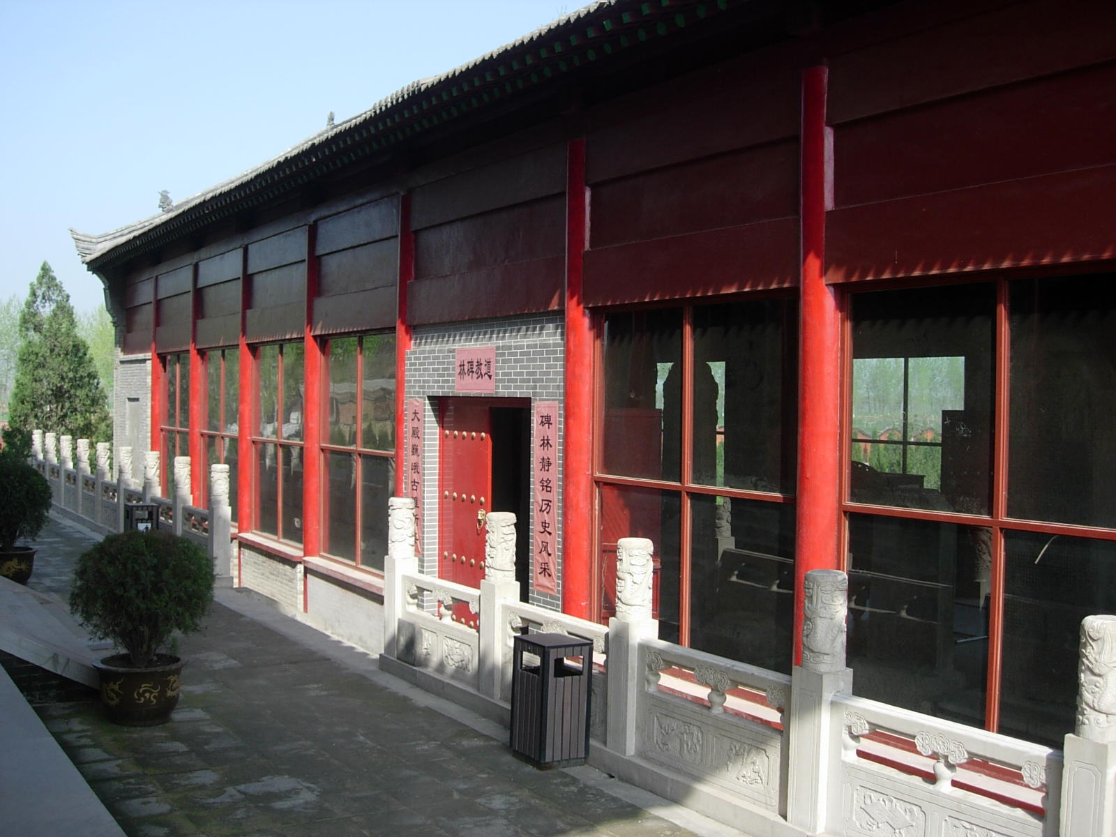 祖庵碑林處